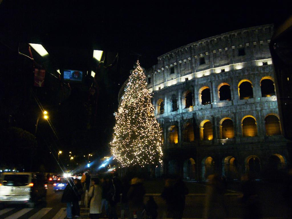 Roma, Natale al Colosseo (2006)